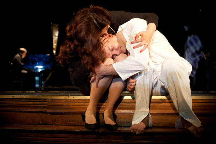 Фото из спектакля Письмовник. Элегия в Одесском академическом украинском музыкально-драматическом театре им. В. Василько. Постановка Алексея Ботвинова.